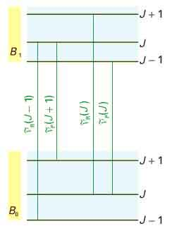 stałe rotacyjne